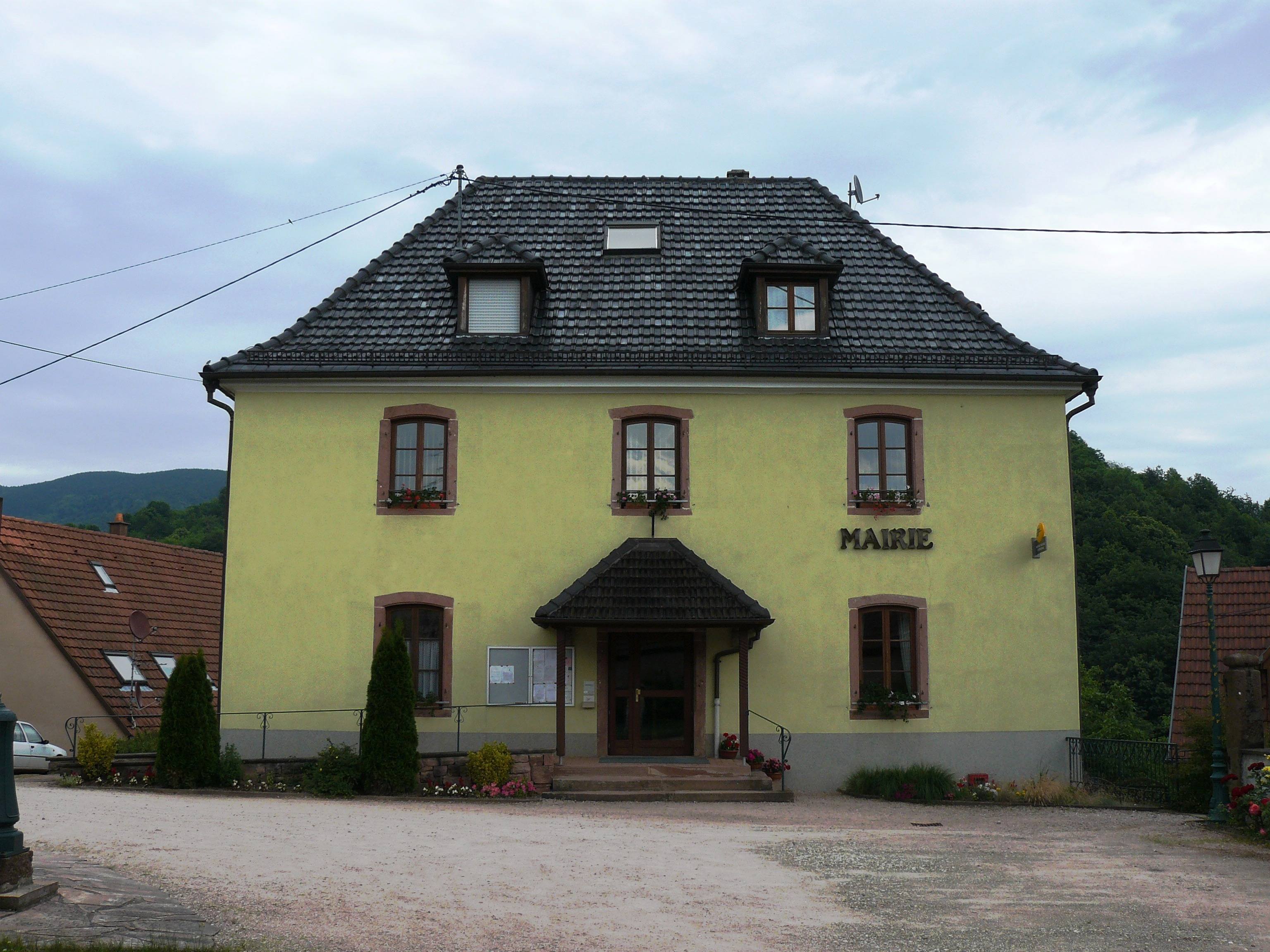 Mairie de Breitenbach, 3 rue du Presbytère